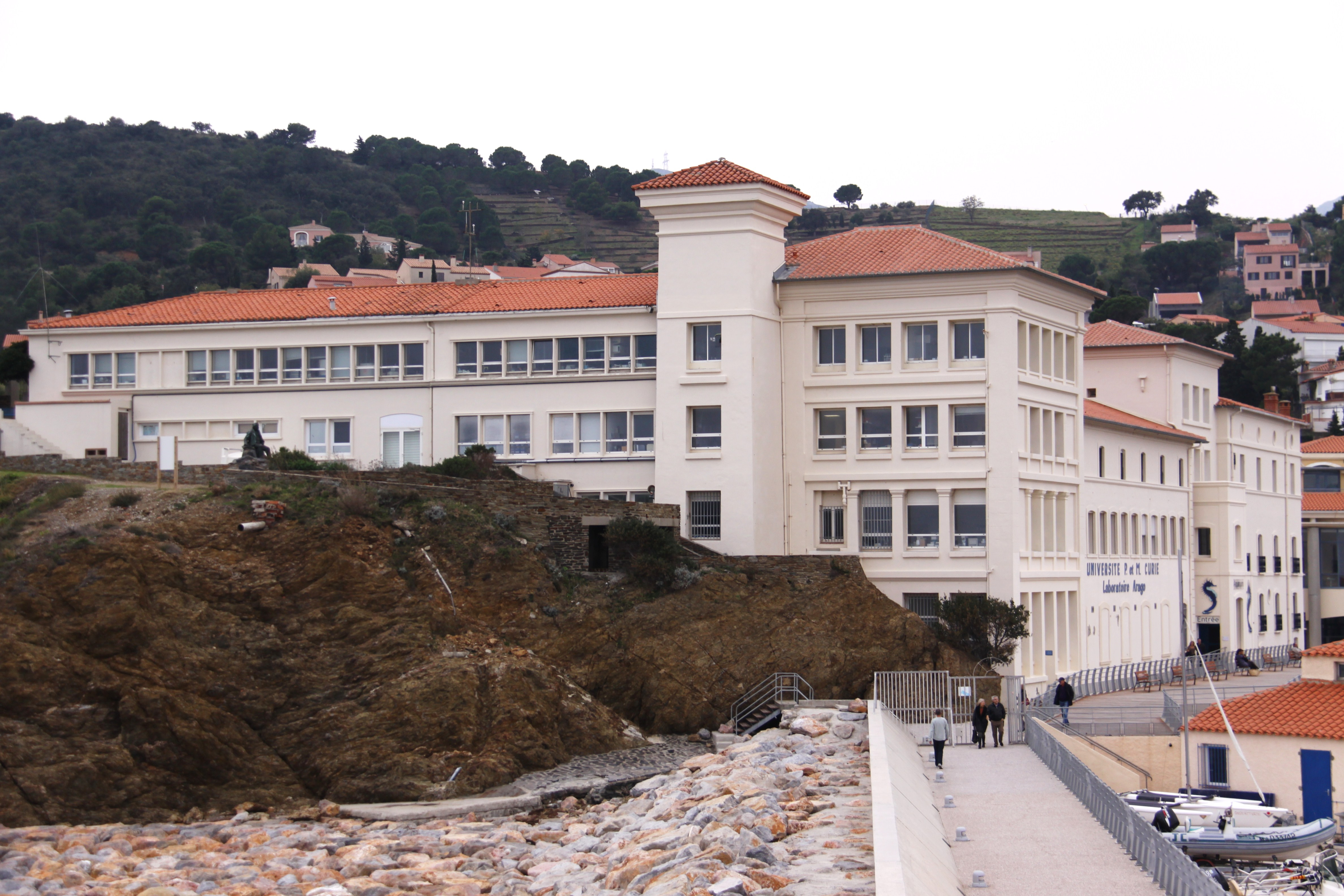 L'Observatoire Océanologique (Laboratoire Arago) de Banyuls-sur-Mer vu depuis le Monument aux Morts. Il a été créé en 1881. C' est une école interne de l' Université Pierre et Marie Curie dédiée à l' étude et à l' enseignement de la biologie marine et de l' océanographie dans la région Languedoc-Roussillon. C' est aussi une unité de recherche du CNRS. Banyuls-sur-Mer, Pyrénées-Orientales, France.